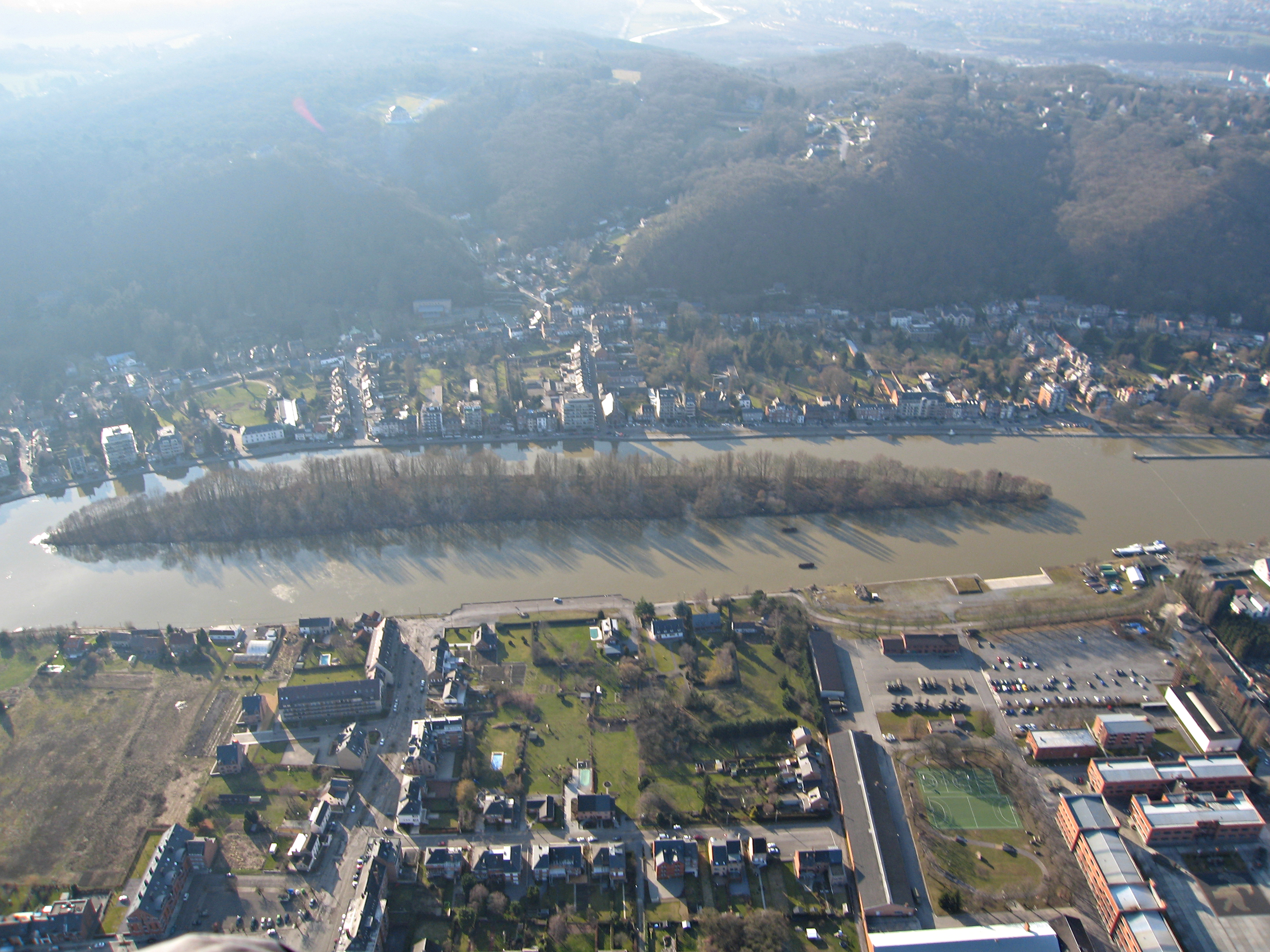 Île Vas-t'y-Frotte